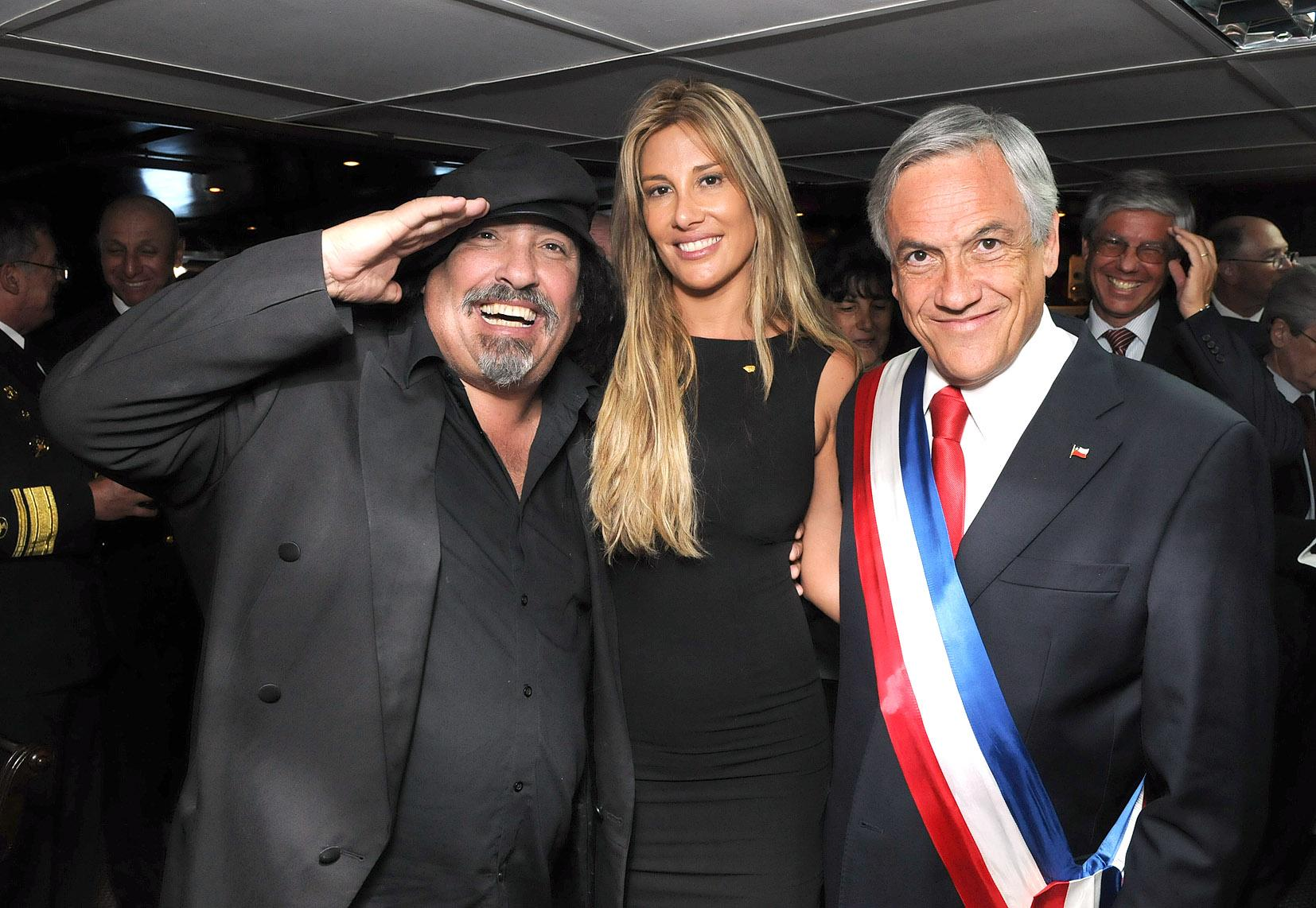 El Mandatario presenció acompañado de ministros y autoridades la Revista Naval Bicentenario a bordo del Buque Escuela Esmeralda. En la oportunidad destacó la presentación, felicitando a las Fuerzas Armadas y Aérea “por la magnífica y formidable demostración de profesionalismo, de amor por la patria y de compromiso con su misión que hoy día hemos podido presenciar dijo. En la foto Miguel "negro" Piñera, Belén Hidalgo y Sebastián Piñera.